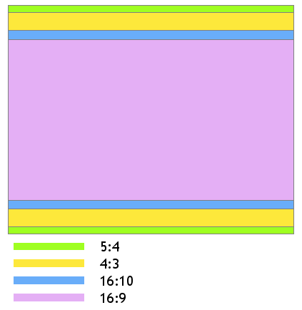 Vybrané poměry stran zobrazené do jedné plochy.